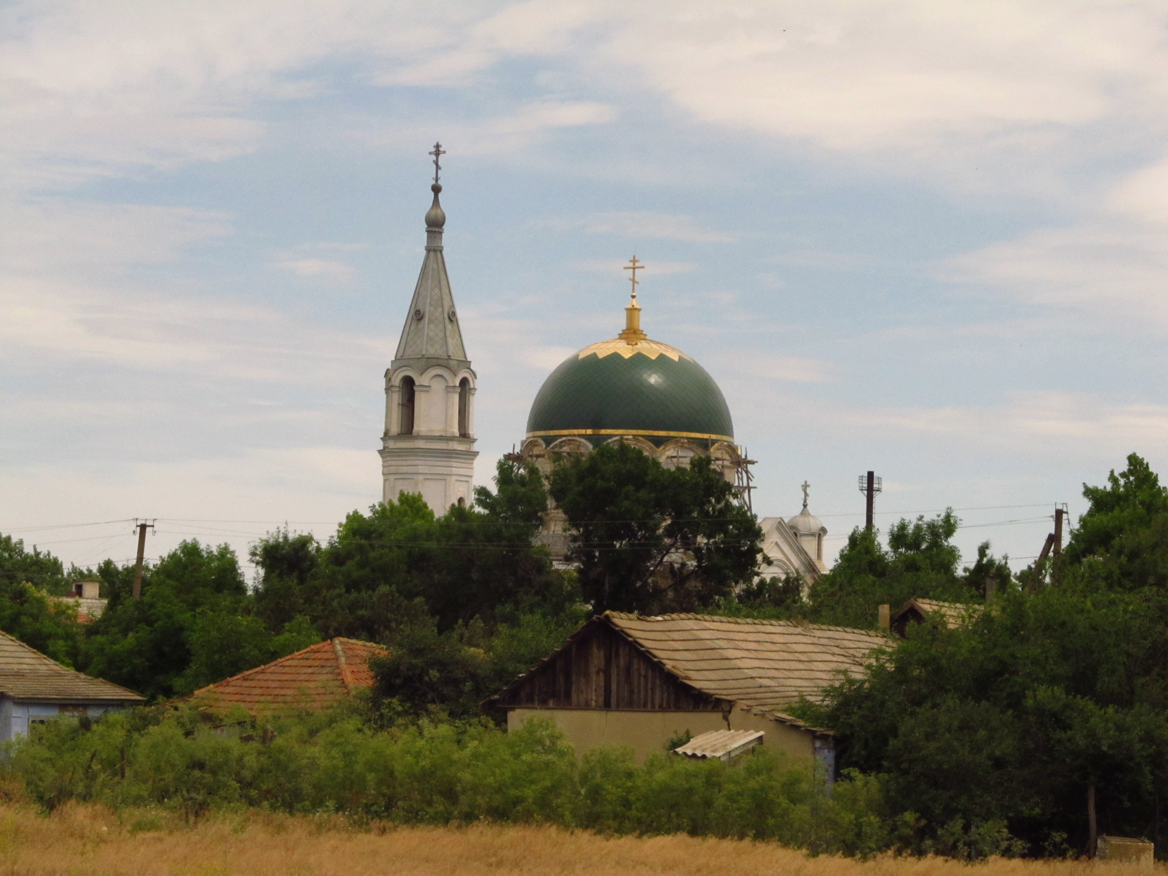 Церква Троїцька, село Старі Трояни